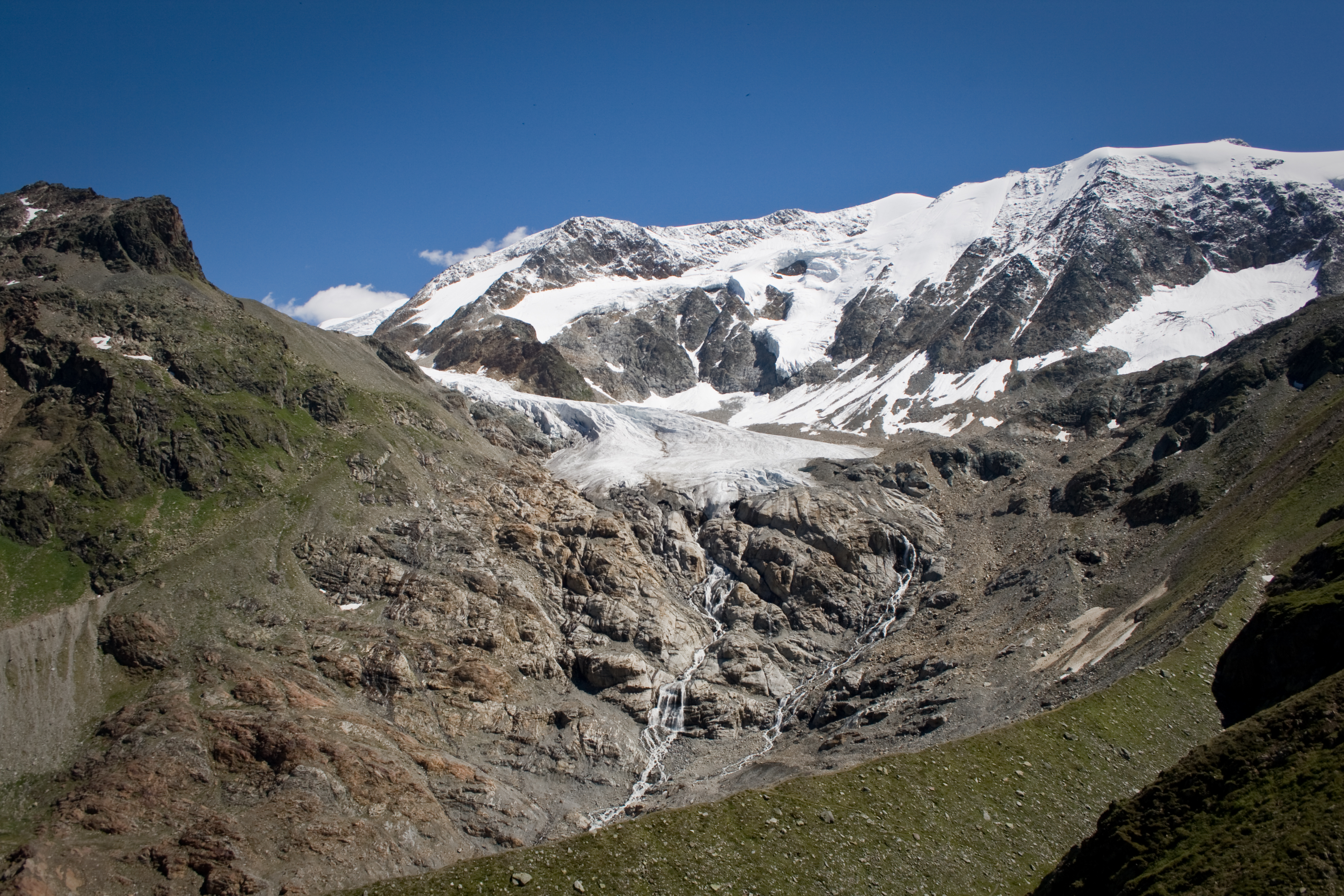 Die Tschachfernerzunge Stand Juli 2010